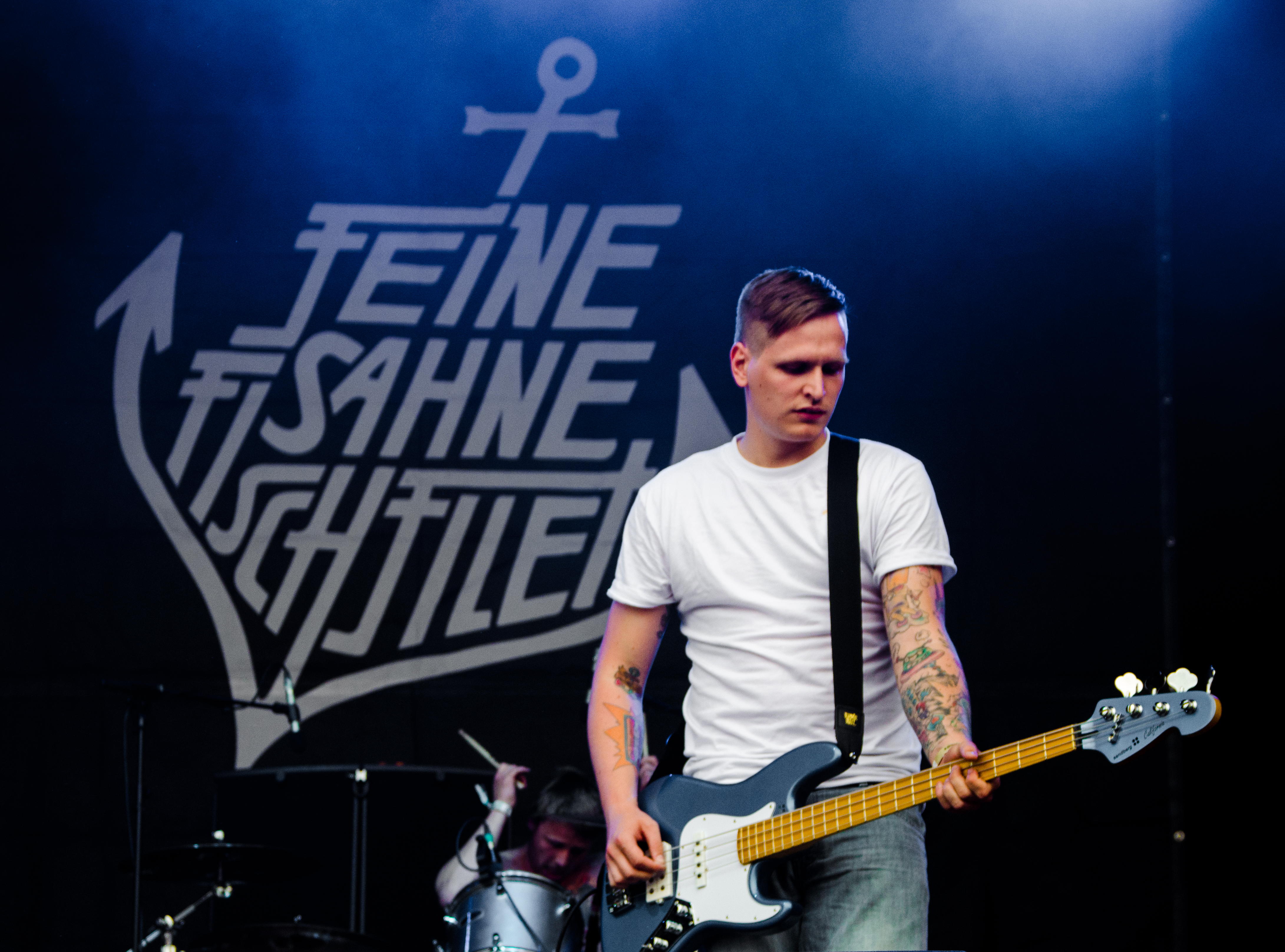 Bassist Kai "Champ" Irrgang, der Band Feine Sahne Fischfilet auf dem Kosmonaut Festival 2014 in Chemnitz Oberrabenstein.